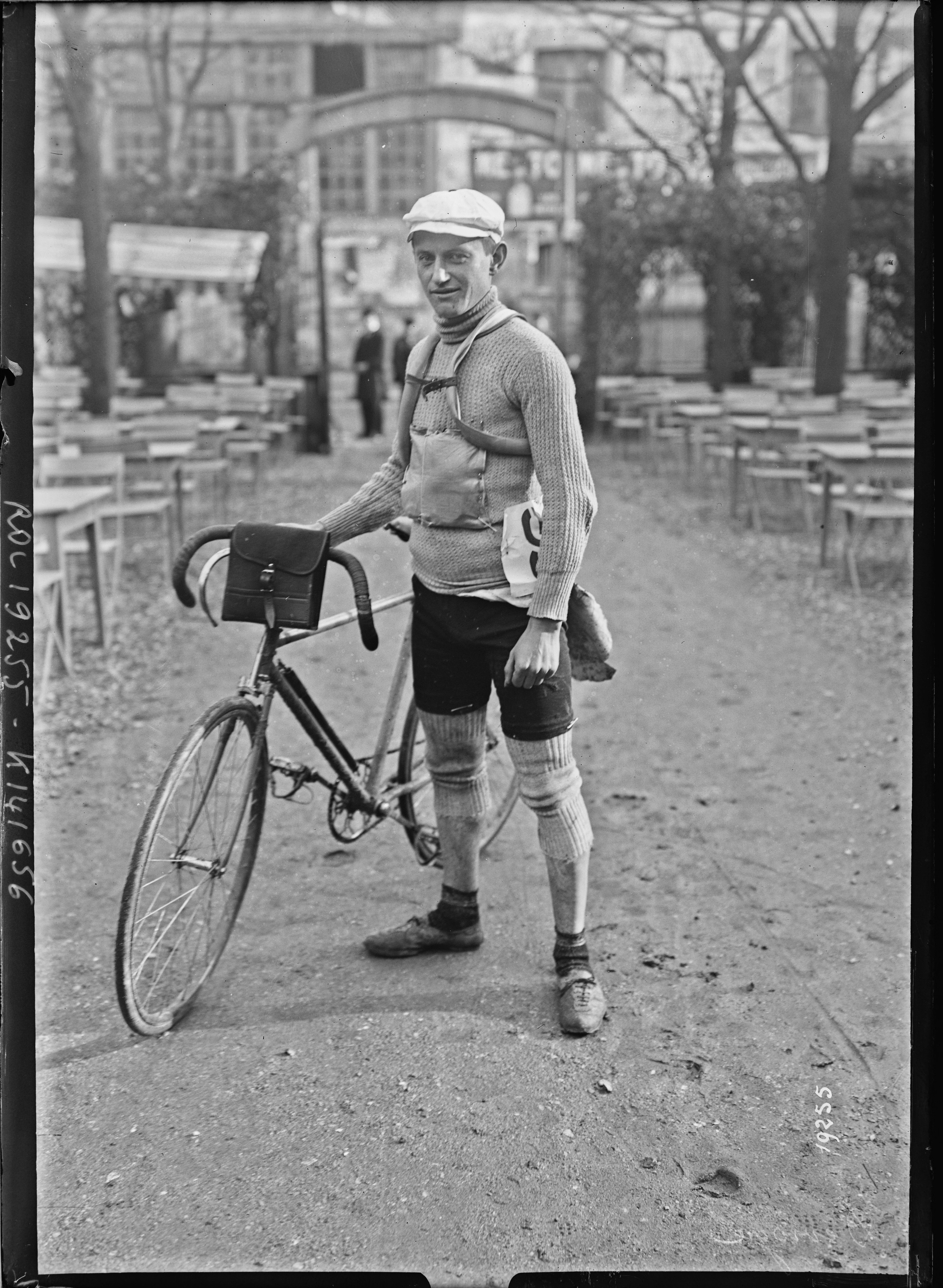 Henri Devroye à Paris-Tours 1912